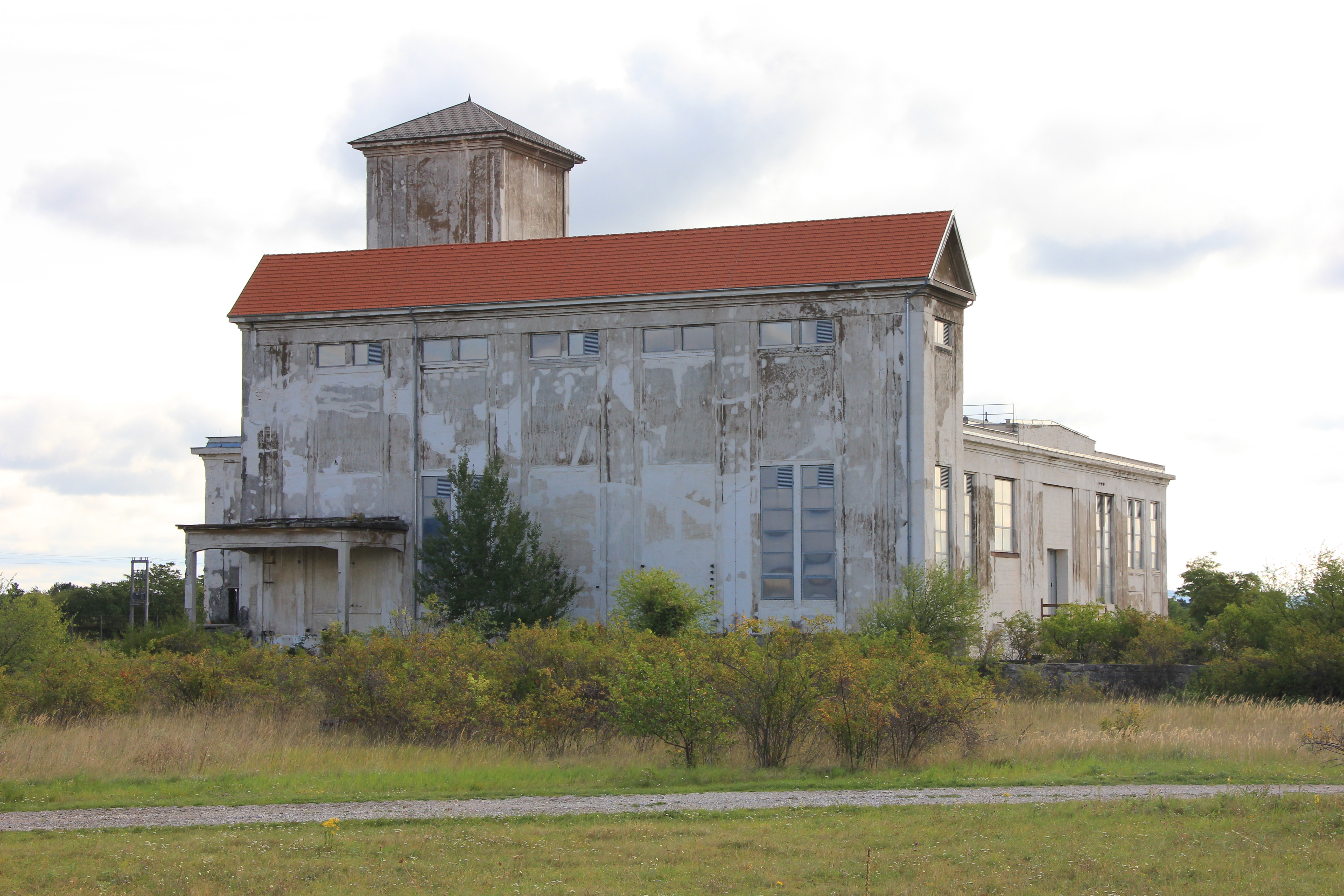 Übungen eines Teils des Katastrophenhilfsdienstes aus dem Bezirk Mödling im Tritolwerk - Ansichten der Ruinen im Tritolwerk